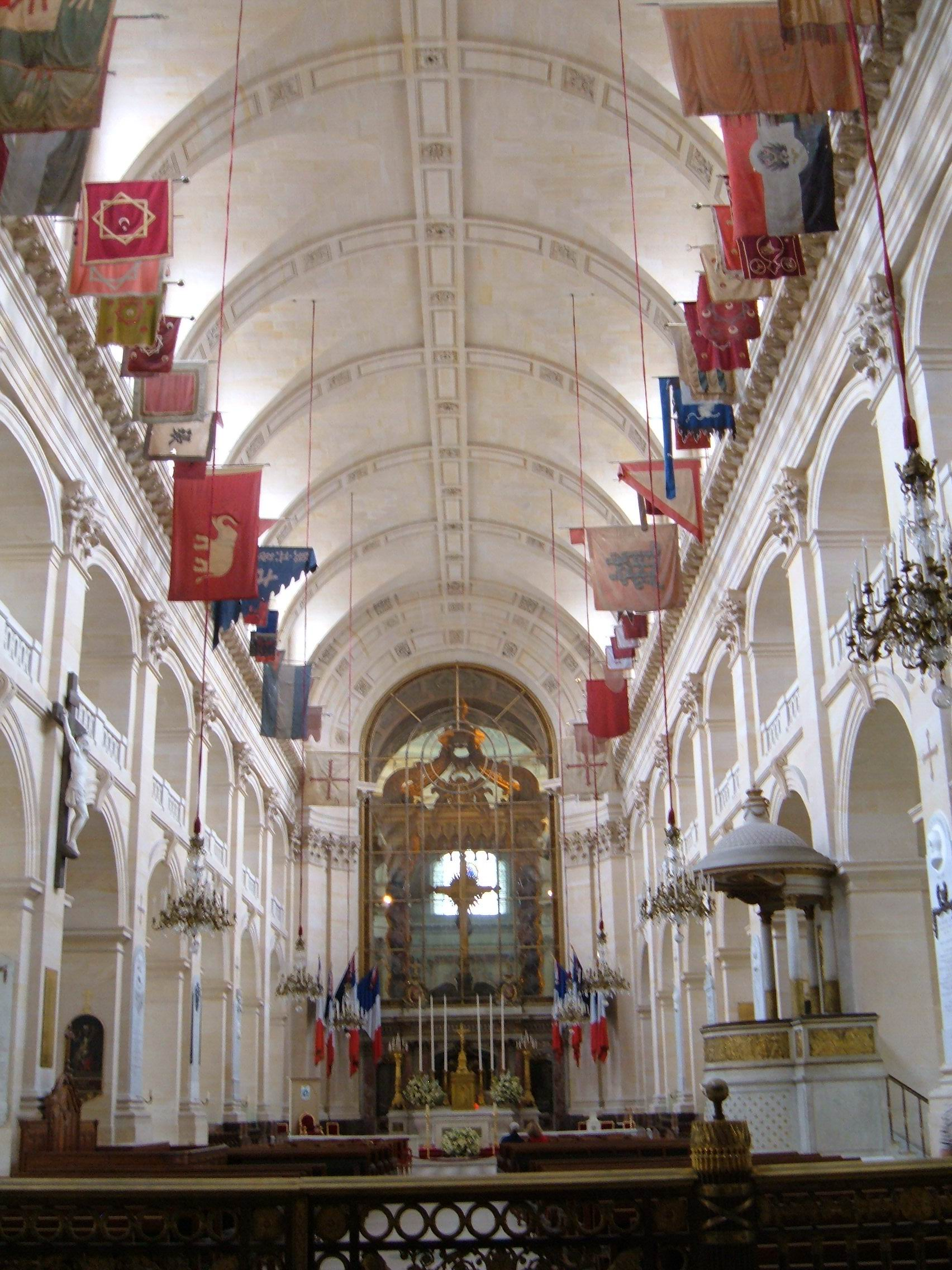 The nave of Saint-Louis-des-Invalides in Les Invalides, Paris, France.